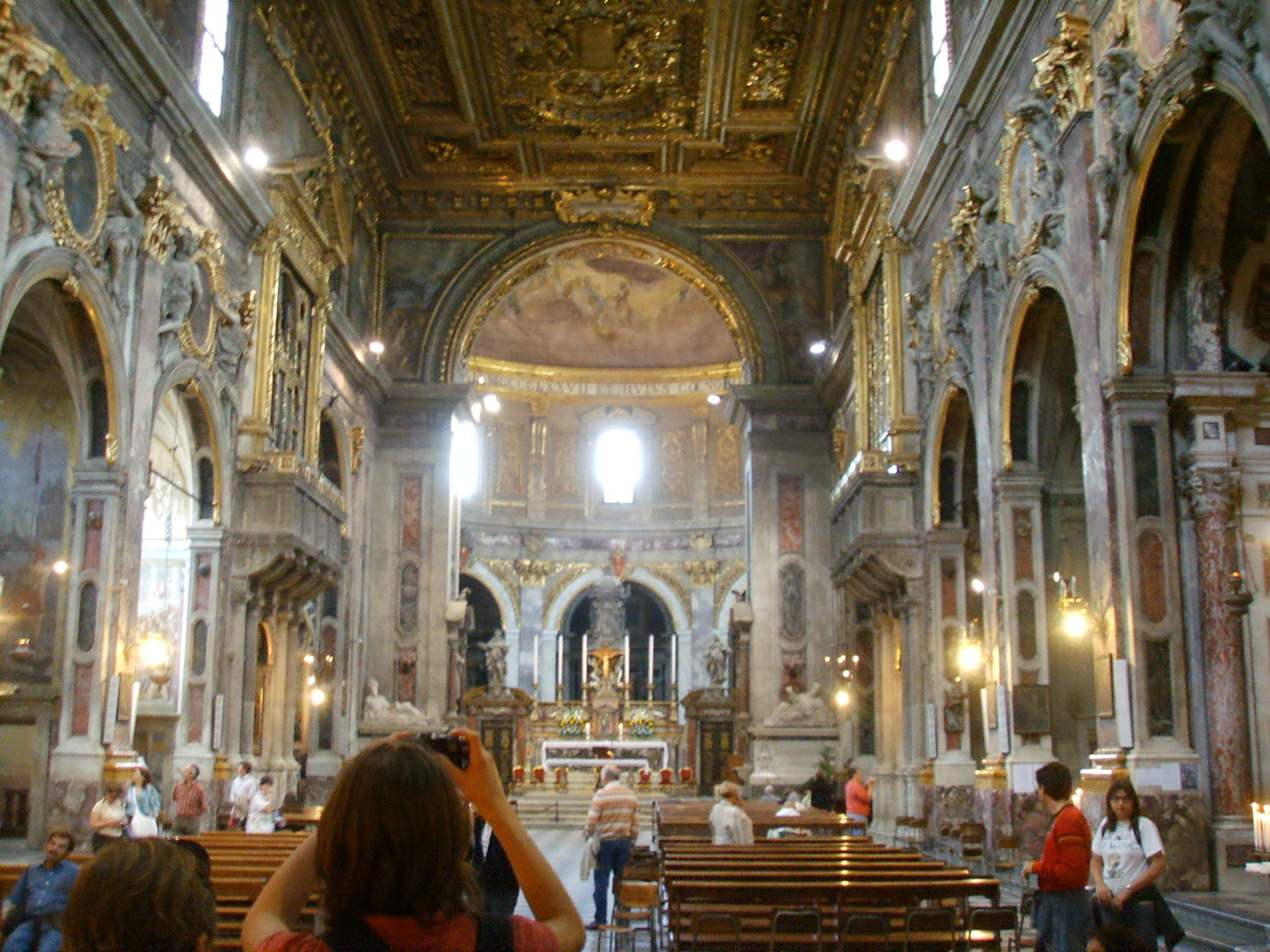 Basilica della santissima annunziata,interno